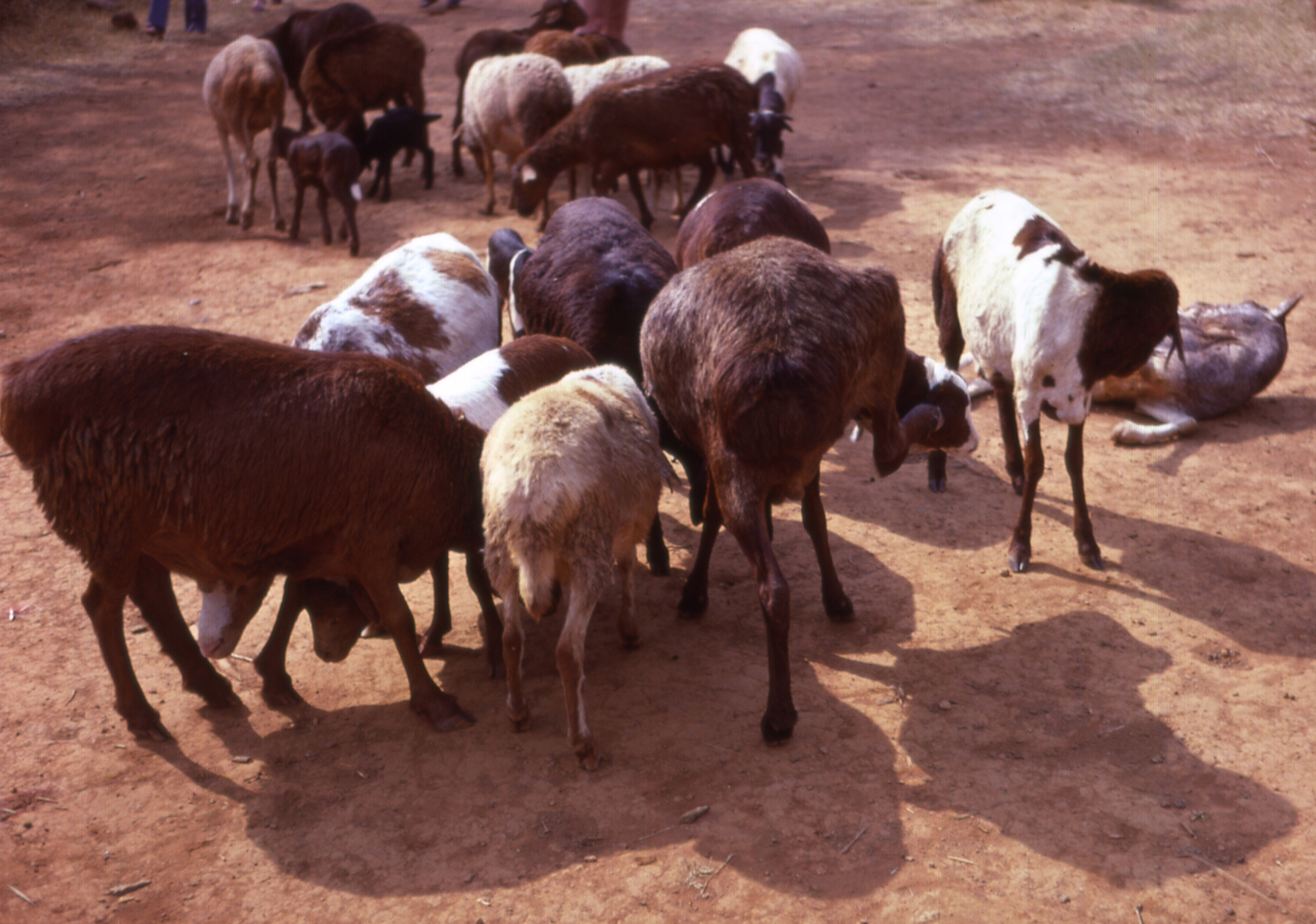 Maasai Red sheep in Kenya.